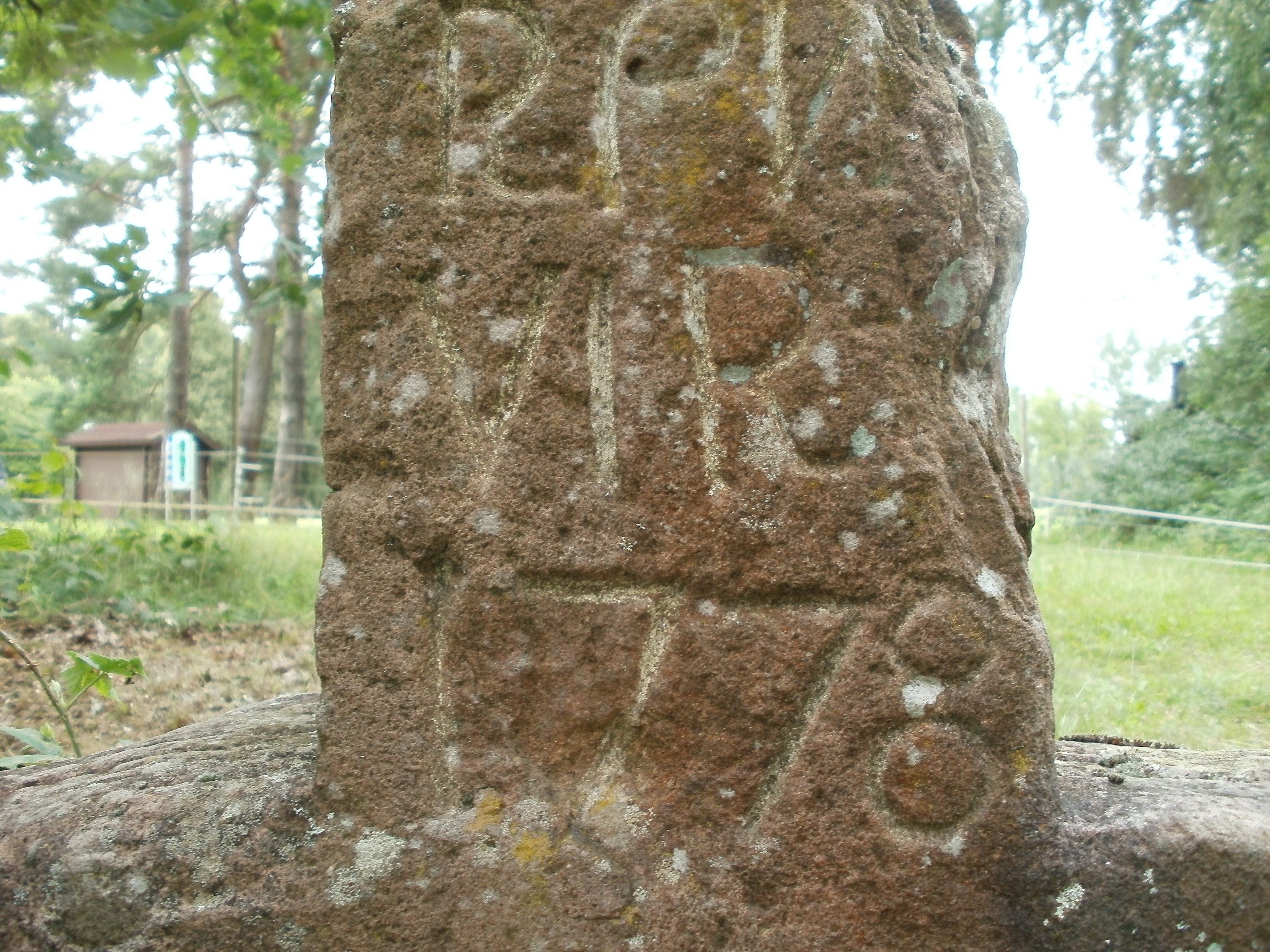 Herzogkreuz im Schwetzinger Hart bei Oftersheim